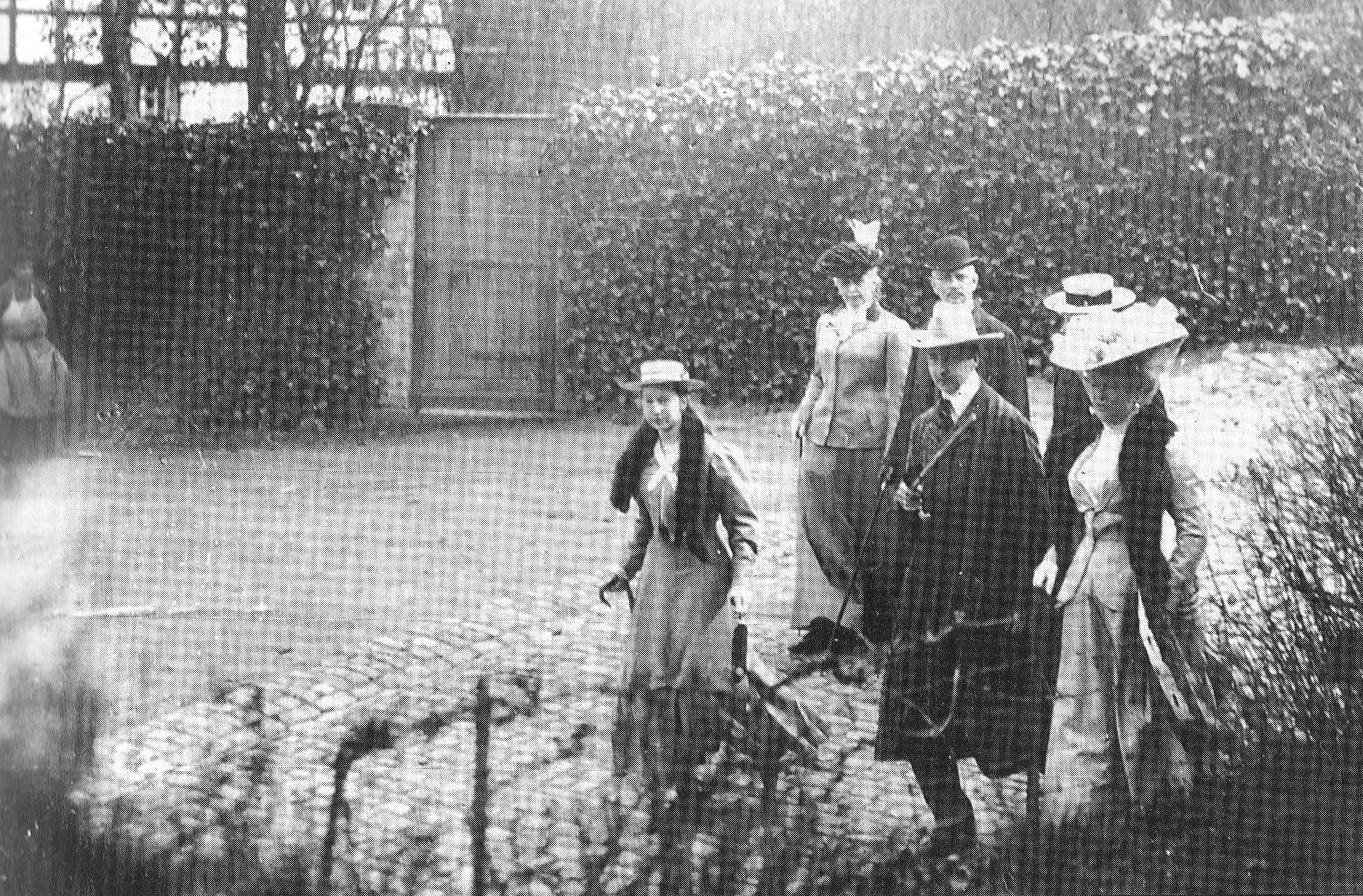 Bildunterschrift: Nach dem Tod von Großherzogin Adelheid-Marie im Jahre 1916 wurde es still auf Schloss Königstein und es gab keine Besuche des europäischen Hochadels mehr, wie hier von der deutschen Kaiserin Augusta mit Prinz Wilhelm (*29.1.1887) und Prinzessin Victoria-Luise (*18.9.1892) im Jahre 1907.